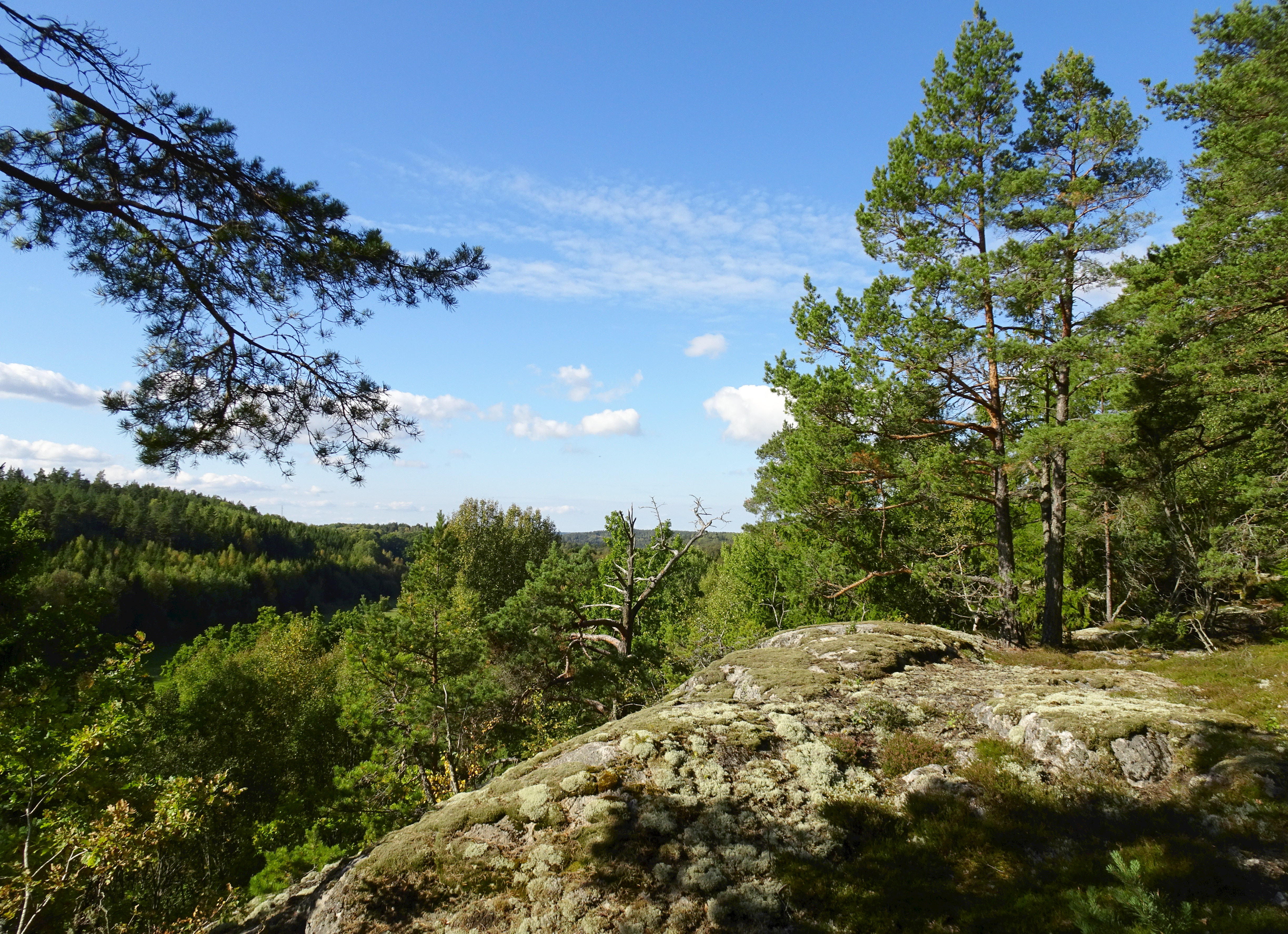 Botkyrkabacken, sluttning mot väst